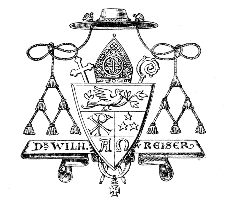 Bischofswappen von Wilhelm Reiser als Titularbischof von Enos und Weihbischof in Rottenburg (später wurde er Bischof von Rottenburg)